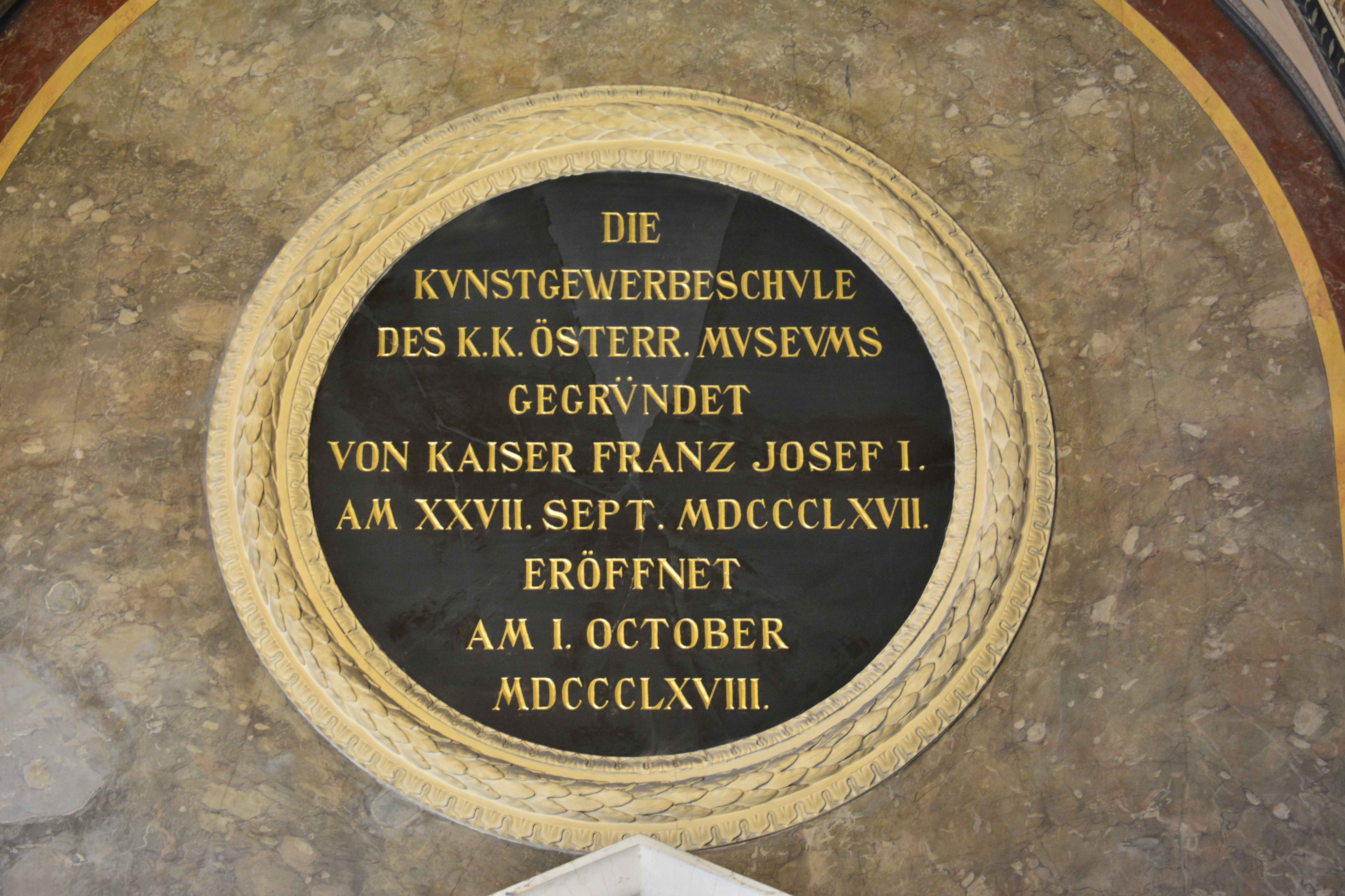 Gedenktafel für die Kunstgewerbeschule des k.k. Österreichischen Museums (Wien, Stubenring 5)